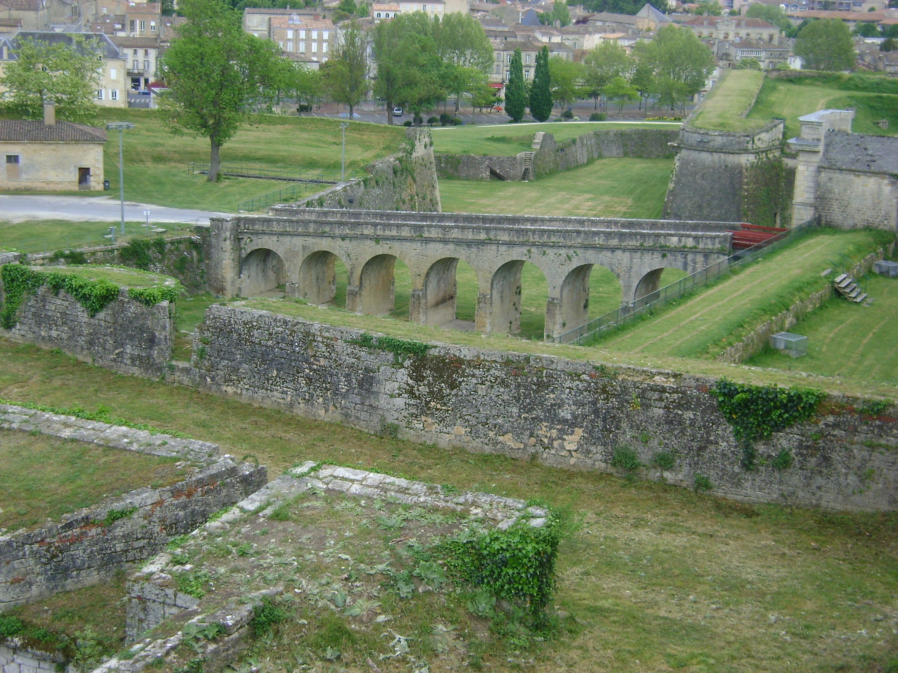 Citadelle de Blaye, Gironde. Accés à la Porte Royal vue du Bastion des Cônes .